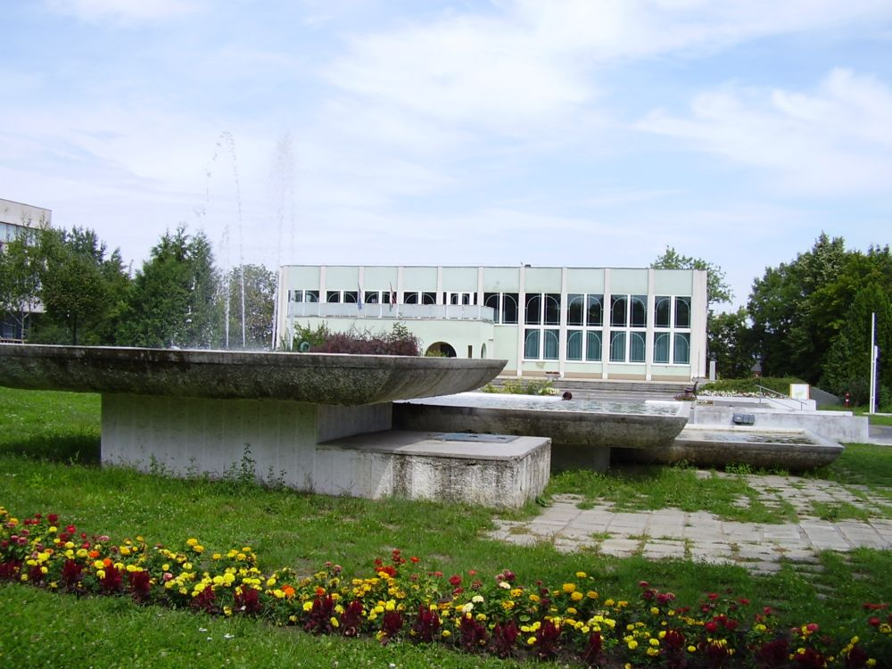 Egressy Béni Könyvtár, Kulturális és Sport Központ (Kazincbarcika, Fő tér 5.)